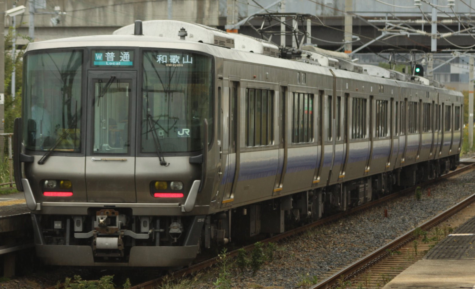 223系2500番台HE428 普通和歌山 きのくに線宮前駅